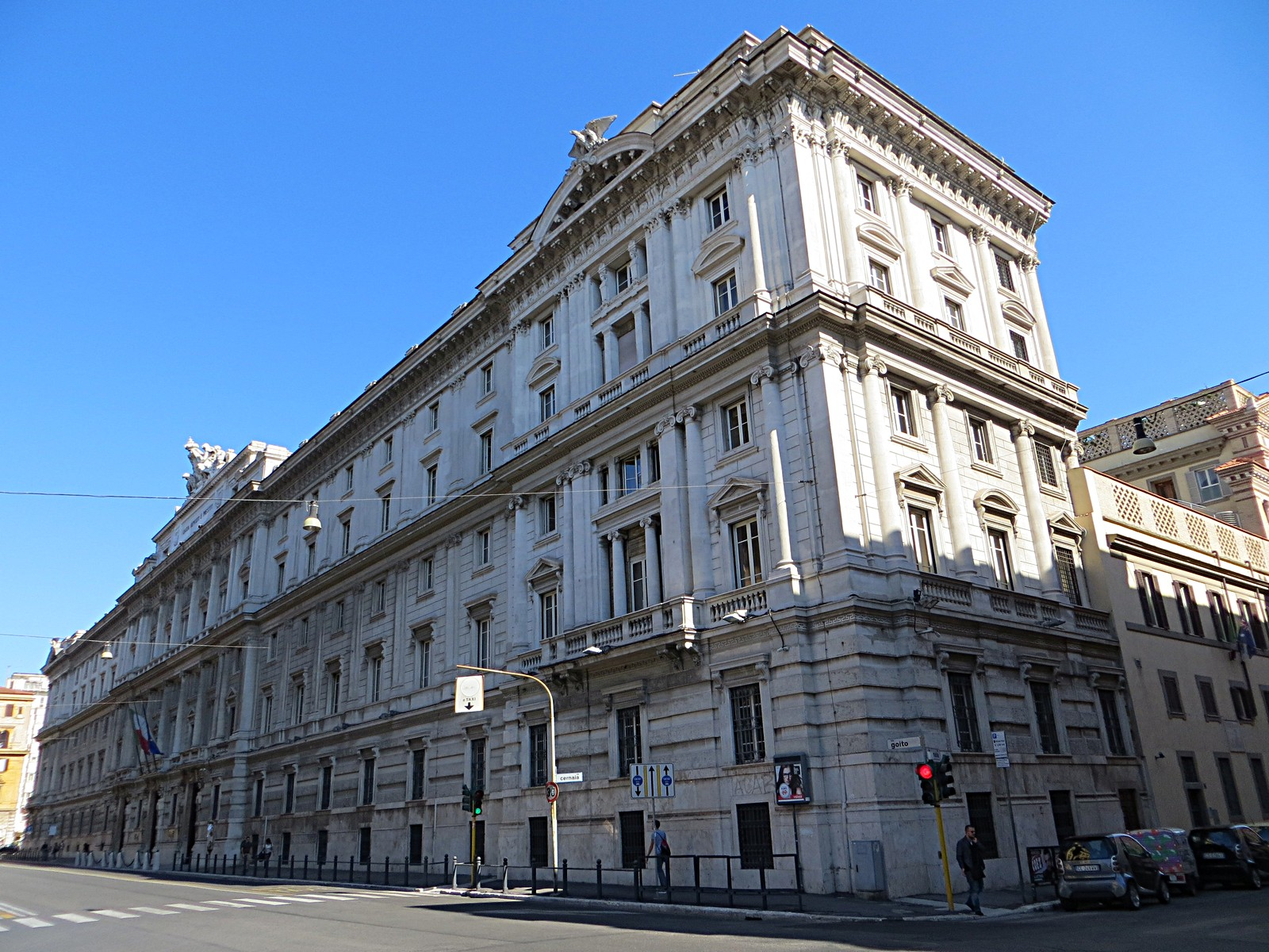 Via Goito